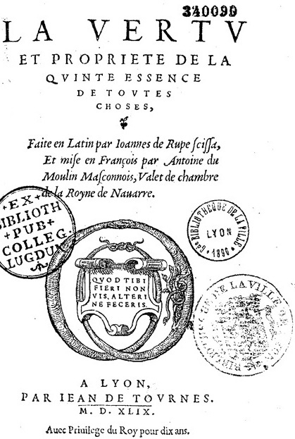 La vertu et propriétés de la quintessence de toutes choses